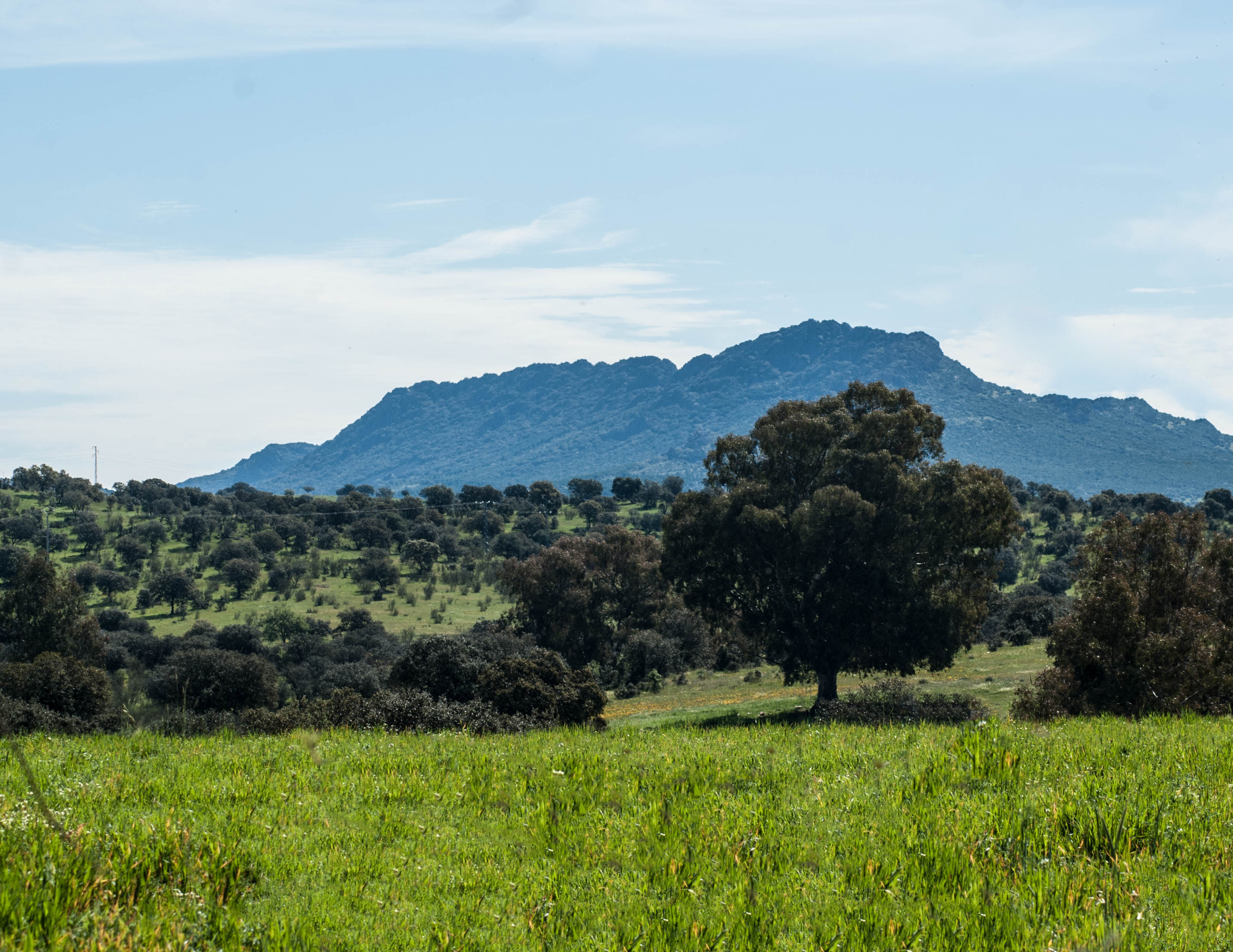 Sierras de Almadén - Chillón - Guadalmez This is a photography of a Special Area of Conservation in Spain with the ID: ES4220015. Natura2000 entry, EEA entry